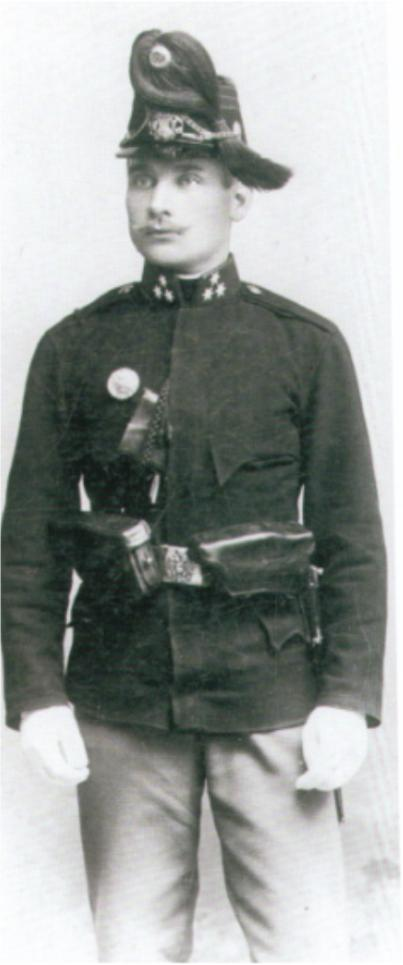 Austro-Hungarian Artillery Zugsführer en Parade